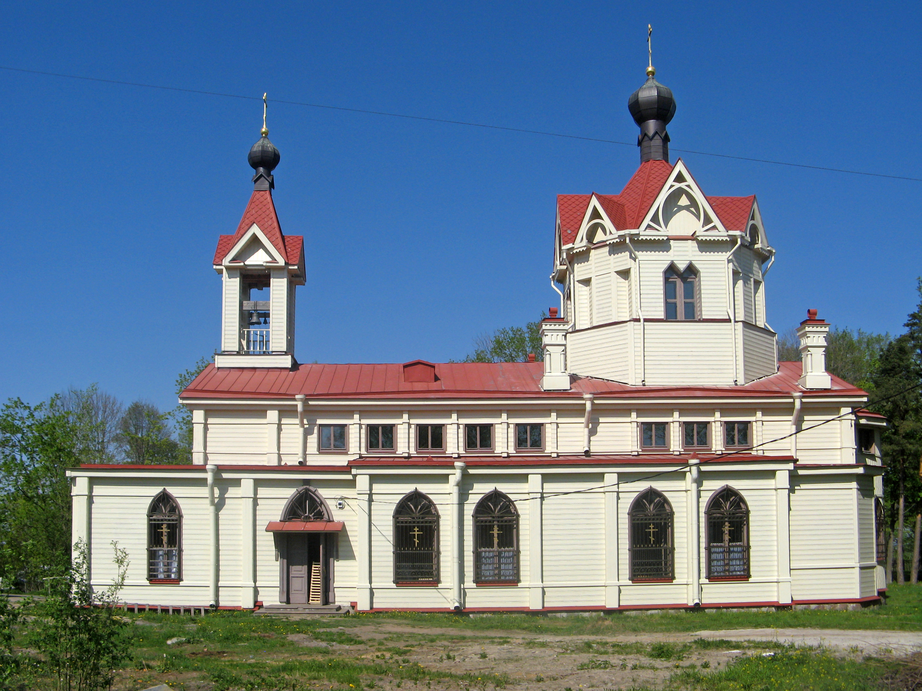 Церковь Святого Спиридония Тримифунтского: Иликовский проспект, 1, Ломоносов, Петродворцовый район, Санкт-Петербург